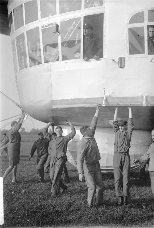 Zum Weltflug-Start des "Graf Zeppelin". Dr. Hugo Eckener, der Führer des "Graf Zeppelin" auf dem Weltflug, in der Führer-Kabine."